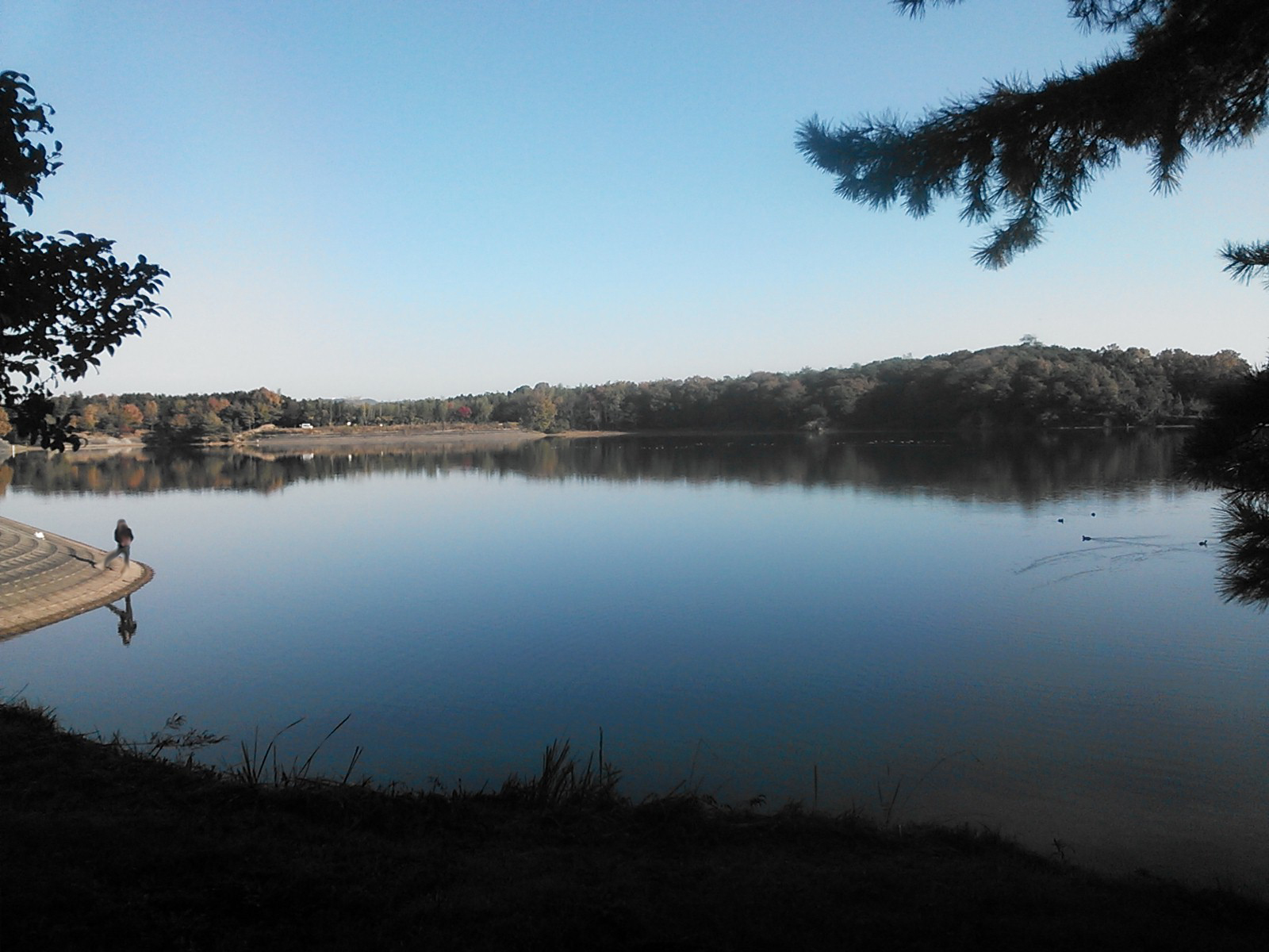 公渕森林公園、公渕池を南西側から撮影。投稿者本人に依る。